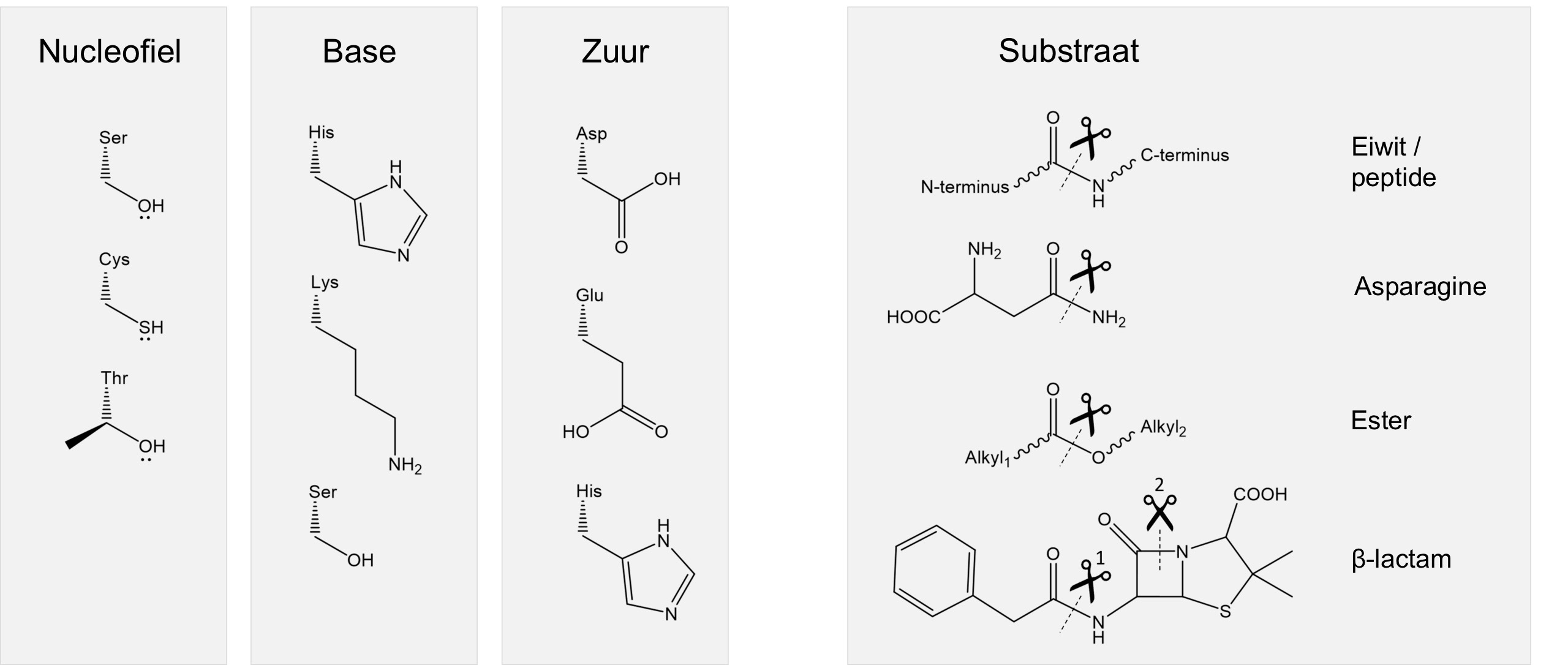 Verschillende residuen die een katalytische triade vormen voor hydrolyse. Links staan voorbeelden van nucleofiele, basische en zure residuen. Rechts staan verschillende substraten; hierbij geeft de schaar aan waar het substraat wordt geknipt.